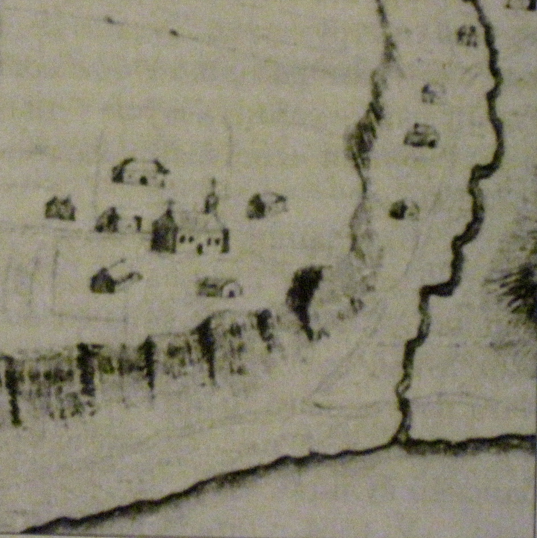 Барысаглебская (Каложская) царква на мапе 1706 г.